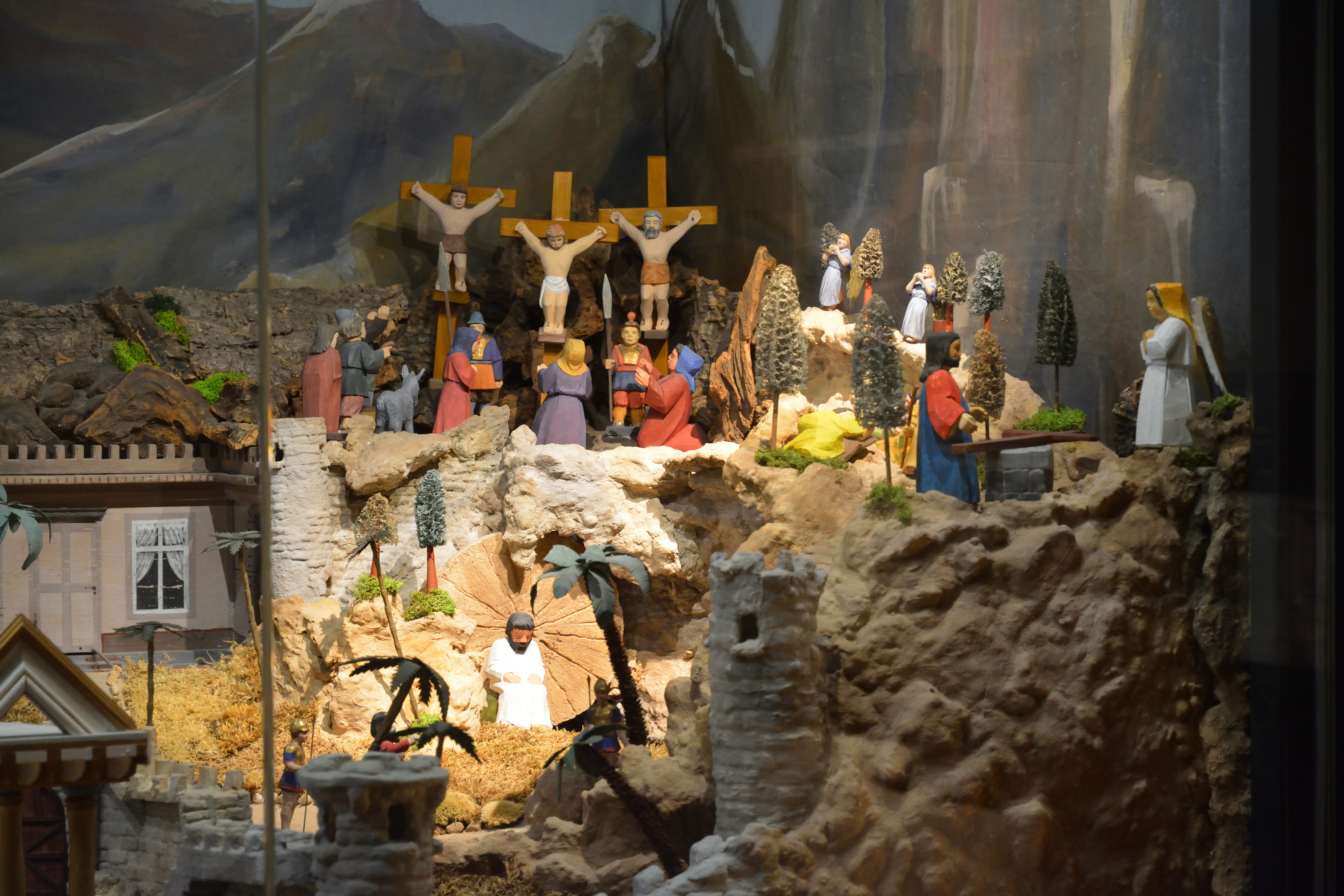 Impressionen aus dem Museum Europäischer Kulturen in Berlin. Ausstellungsraum: Der mechanische Weihnachtsberg aus dem Erzgebirge [1][2]